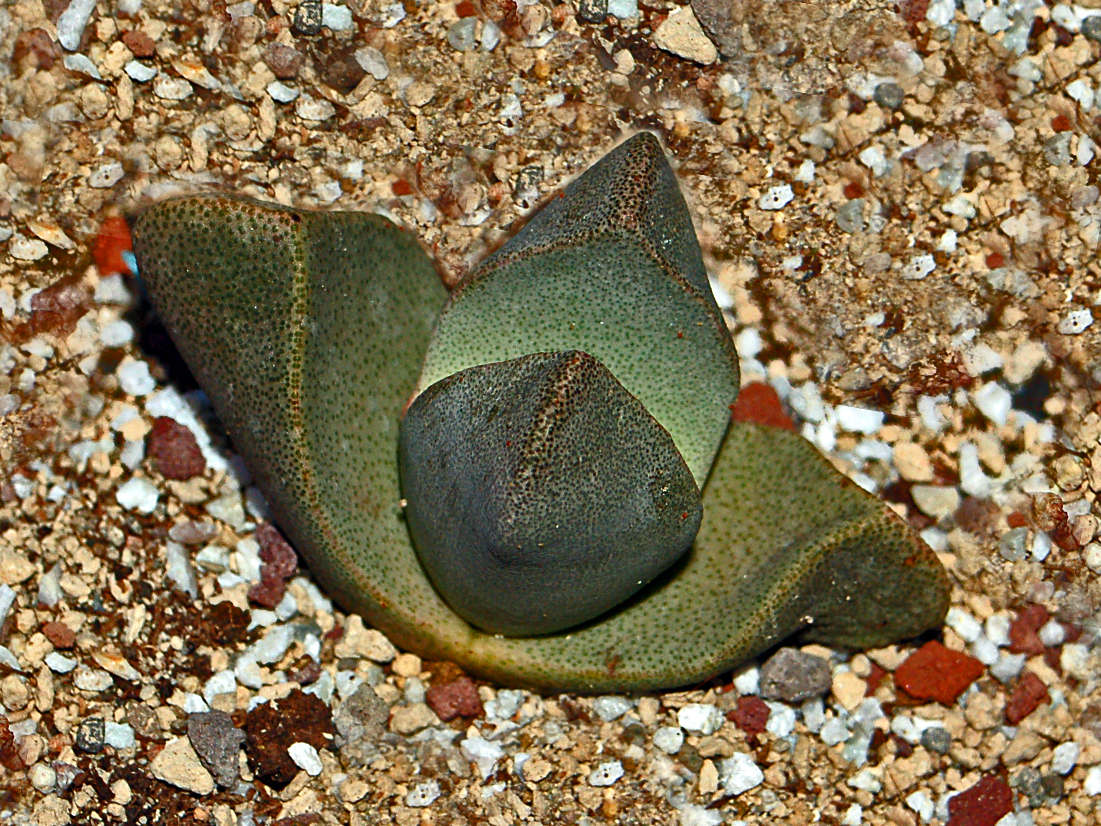 Pleiospilos bolusii at the Orto Botanico dell'Università di Genova